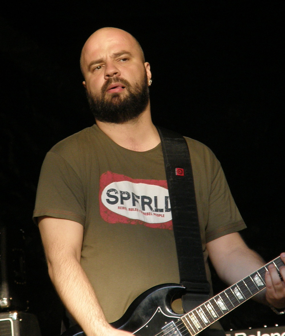 Mihkel Raud Hirvepargis.